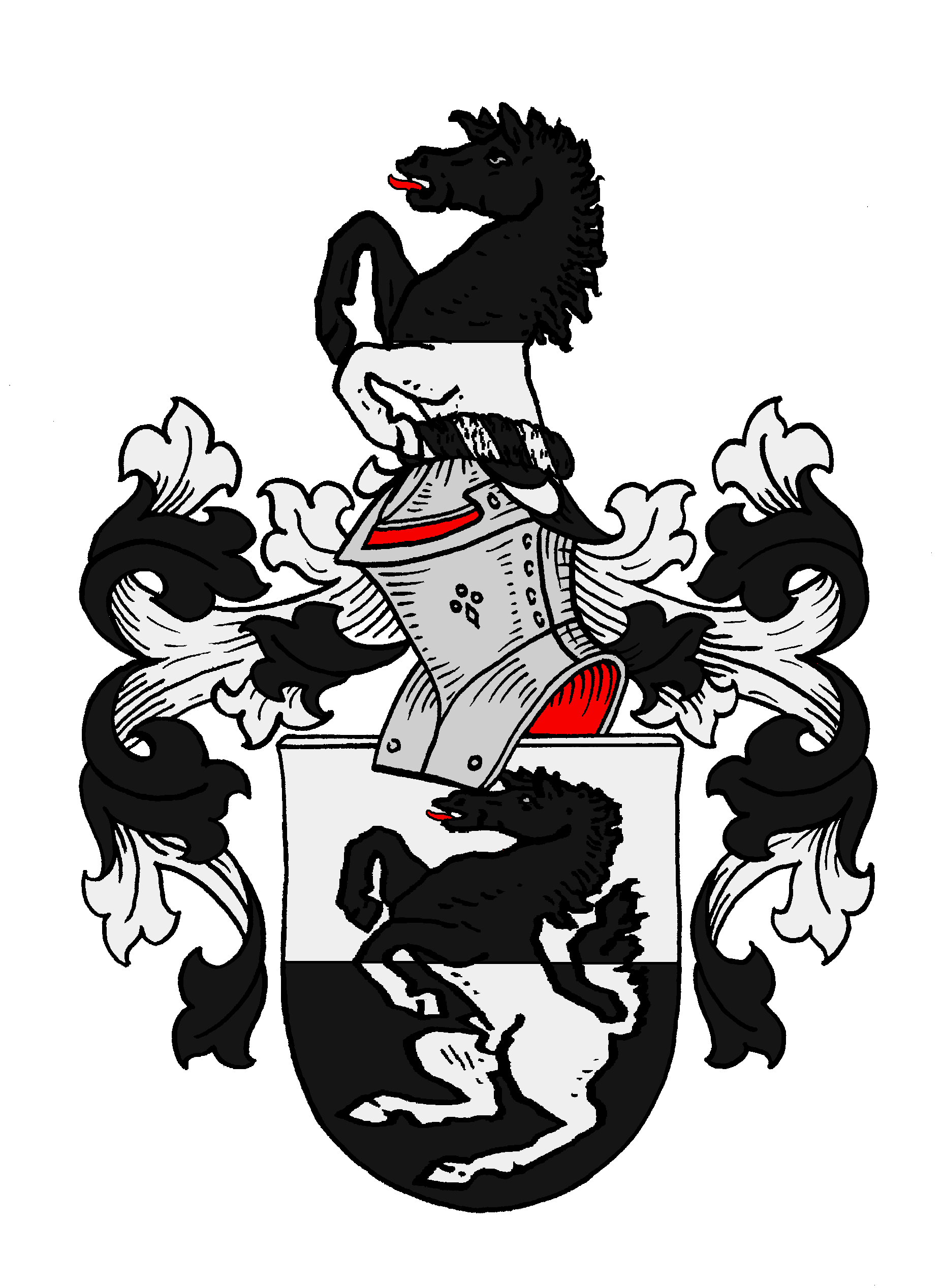 Stammwappen der Payr aus dem Oberinntal, seit 1636 Payr von Thurn